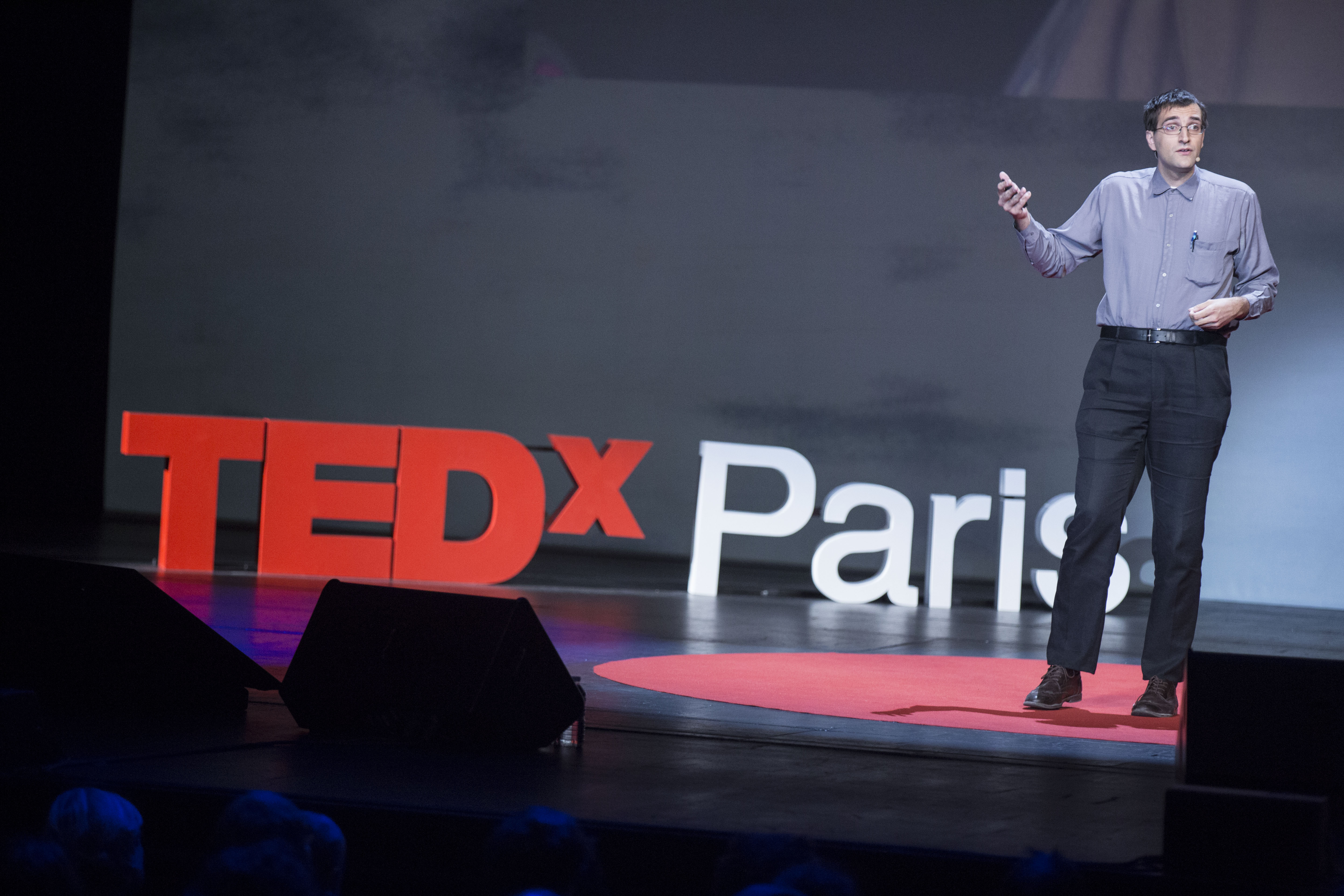 Témoins du mondes - Josef Schovanec - (CC) Olivier EZRATTY